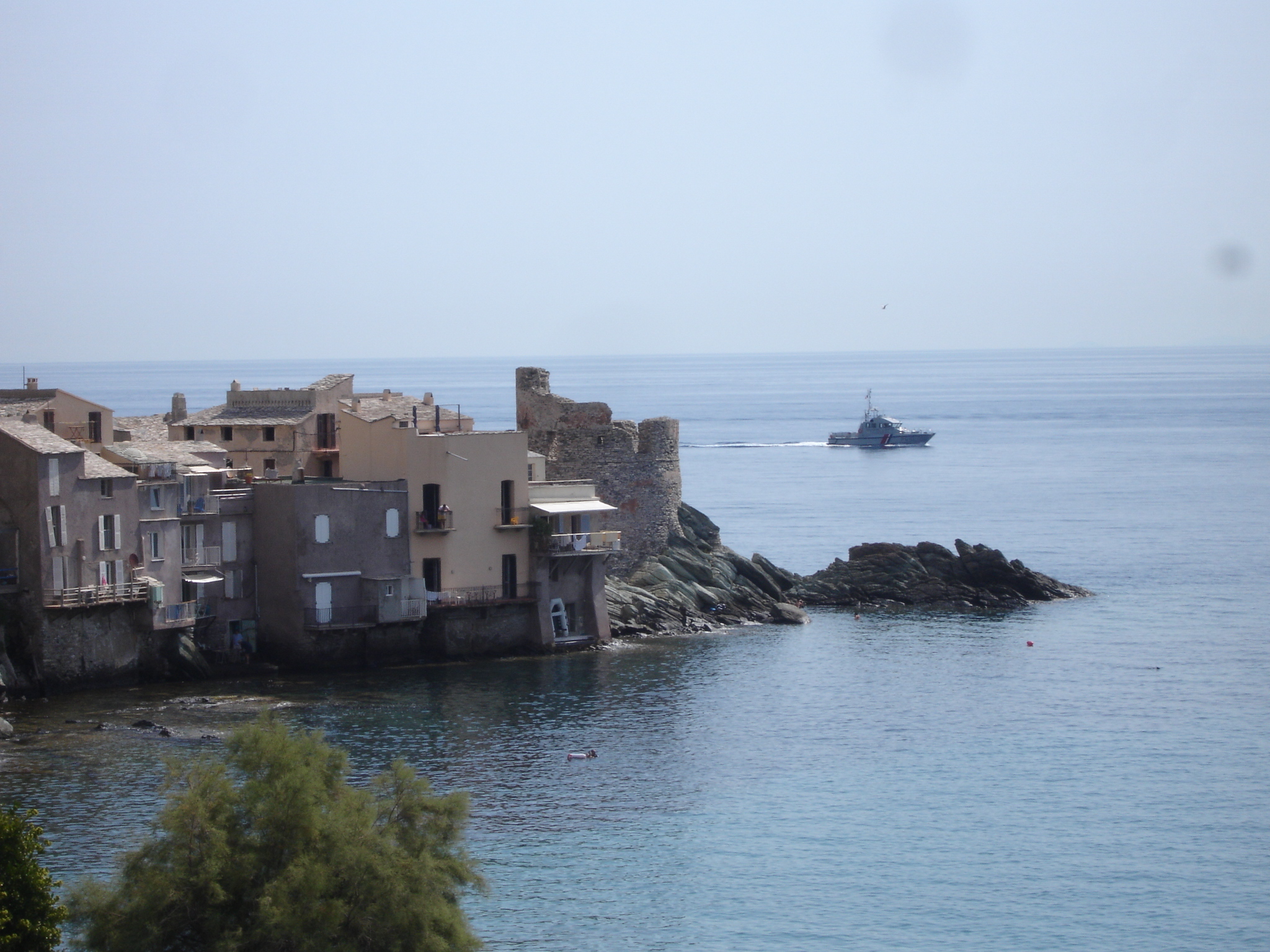 France, Haute-Corse (2B), Brando, Erbalunga et sa tour génoise